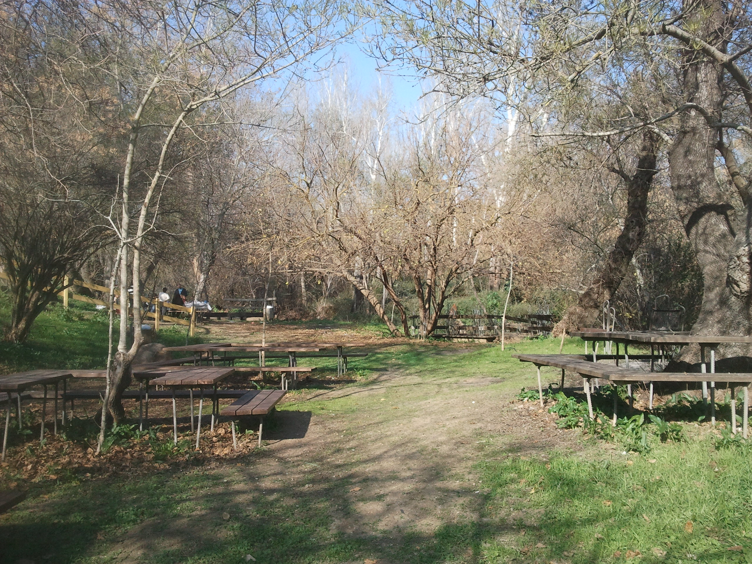 פארק הזהב הוא הפארק המרכזי העירוני בקרית שמונה. בתוכו זורם נחל עין זהב אזור חניון של נופש משפחות